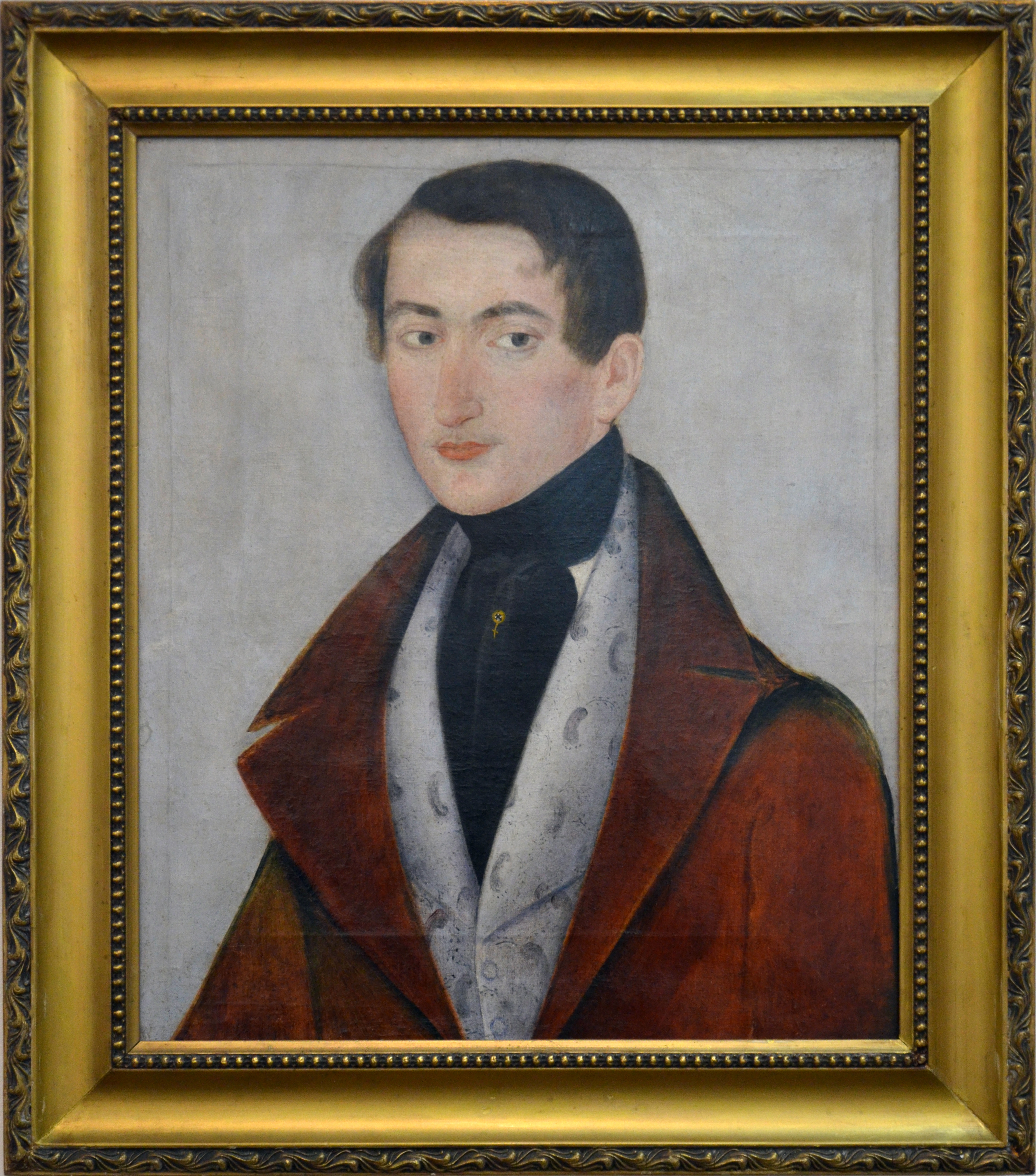 Портрет Івана Григоровича Озаркевича (1795—1854). Виставка «Портрет міста. Львів кінця ХVІІІ — першої половини ХІХ ст.» (15.12.2017—04.01.2018)